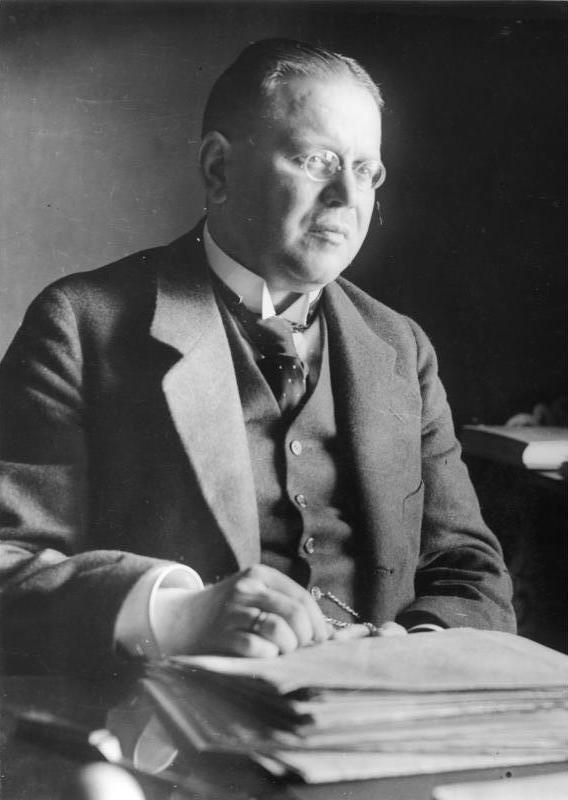 Nationalversammlung in Weimar 1919. Die neue Regierung im Weimarer Schloß. Erzberger - Minister in der Weimarer Regierung. (Zentrums-Abgeordneter und Schriftsteller. Wurde 1921 ermordet). Bild: 9139. Weimar: 1919 Negativ: 239 Diethart Kerbs, Berlin